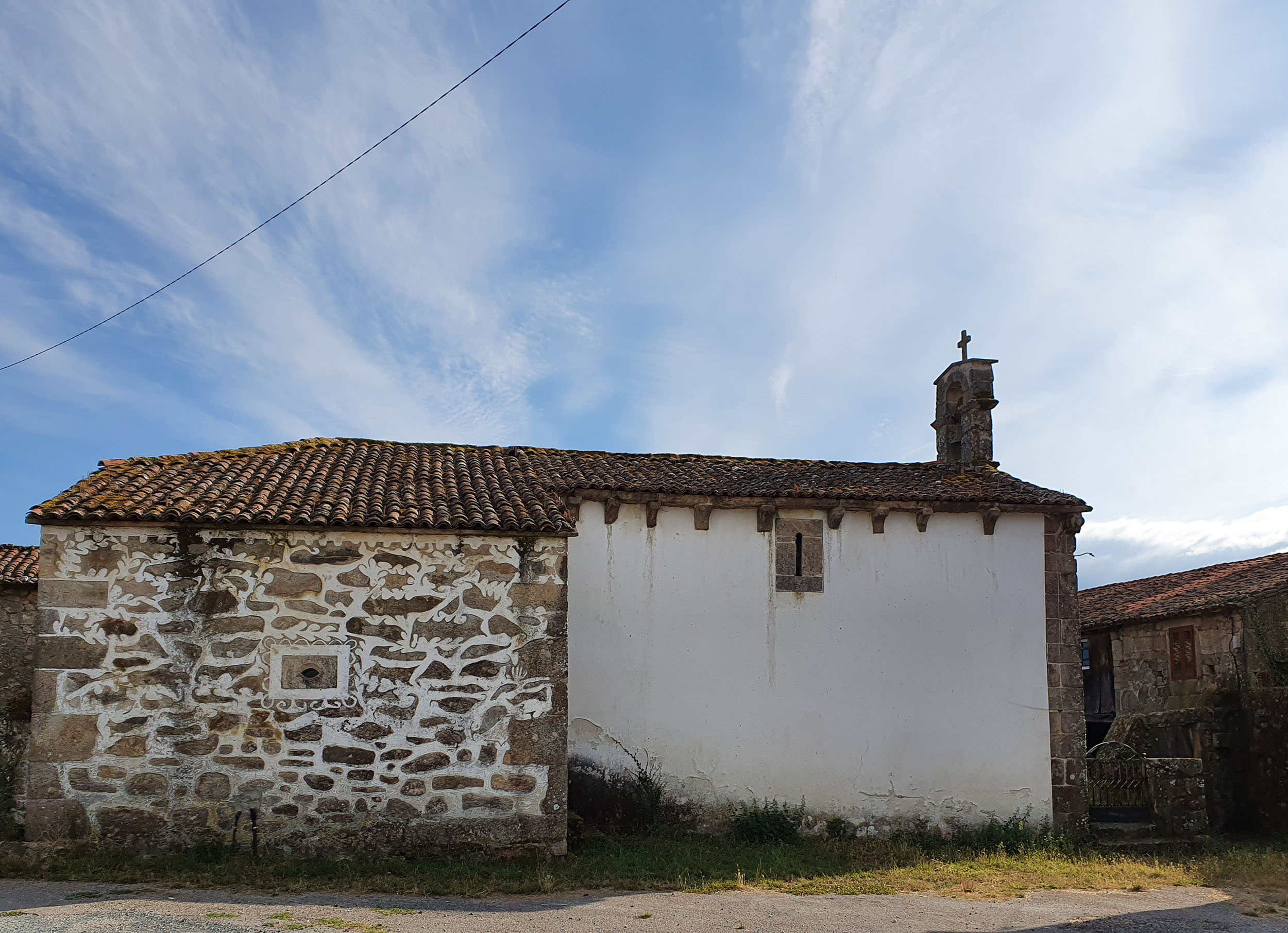 Igrexa románica de Santa María de Alvidrón (Antas de Ulla). Vista lateral, que conserva na parte alta da parede que corresponde á sacristía (adosada ao presbiterio) unha mostra do esgrafiado da zona.